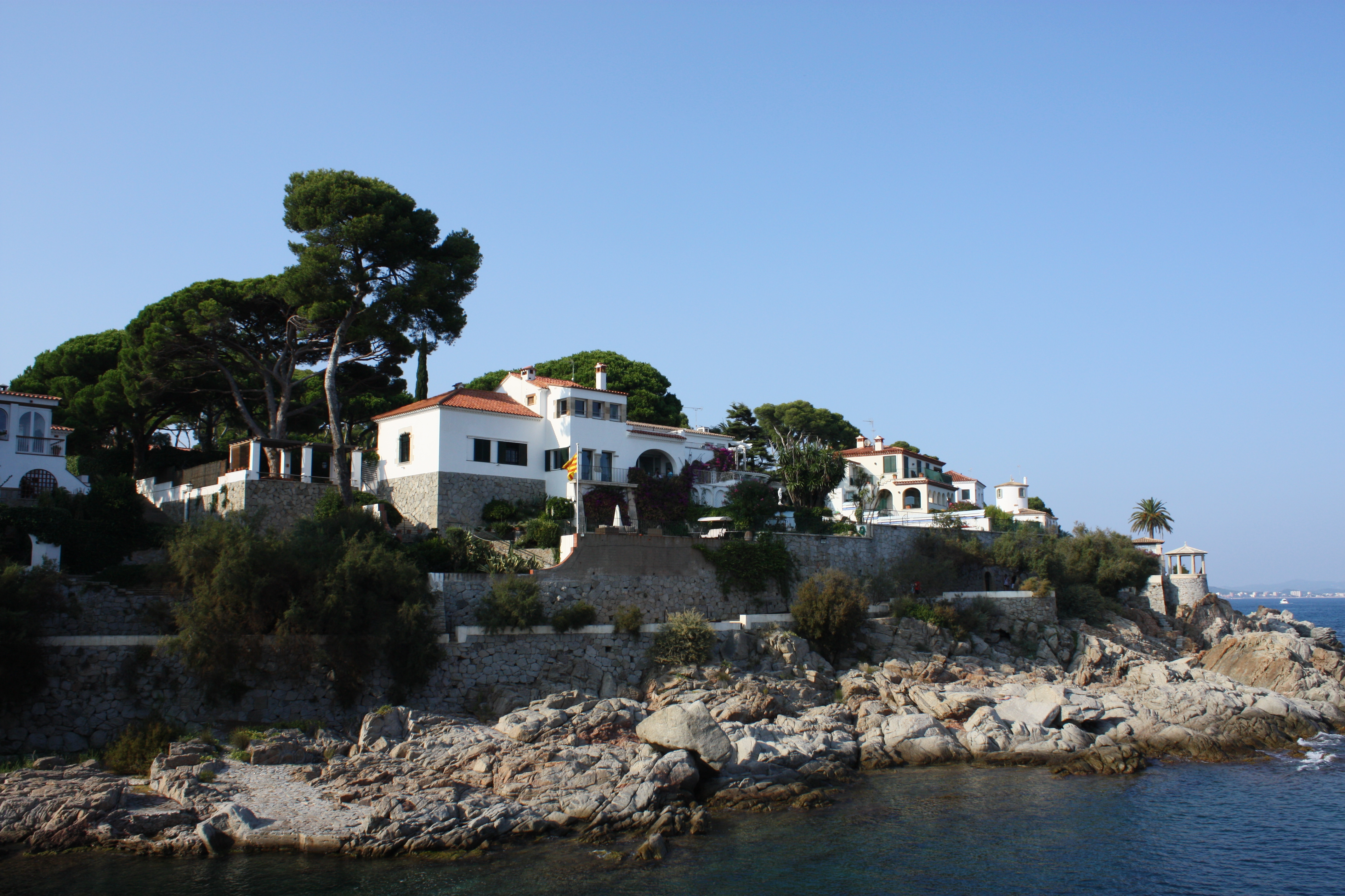 Vista d'alguns dels xalets primituius de la Urbanització de S'Agaró i del Camí de Ronda